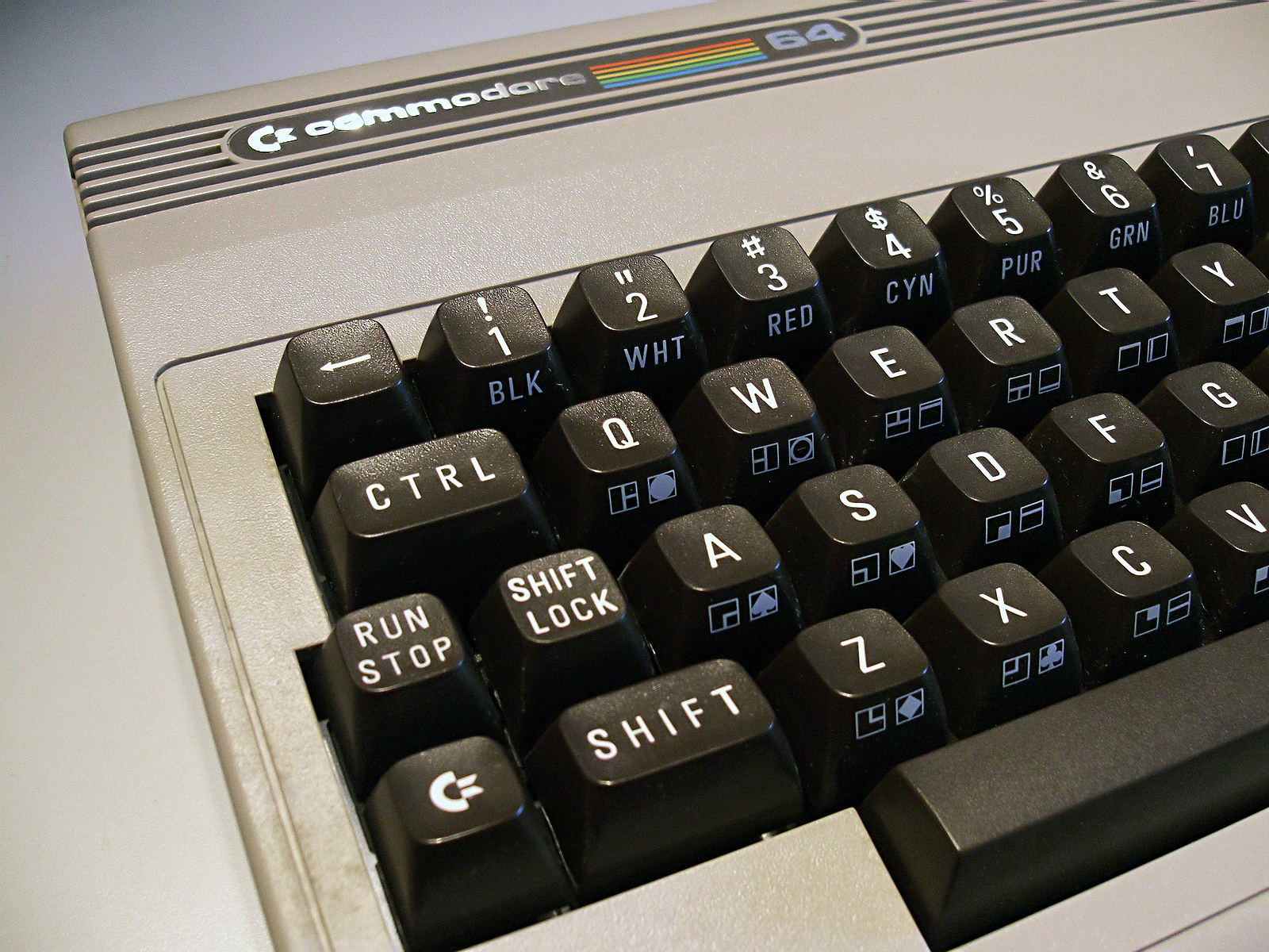 Commodore C64 Tastatur Links Nahaufnahme